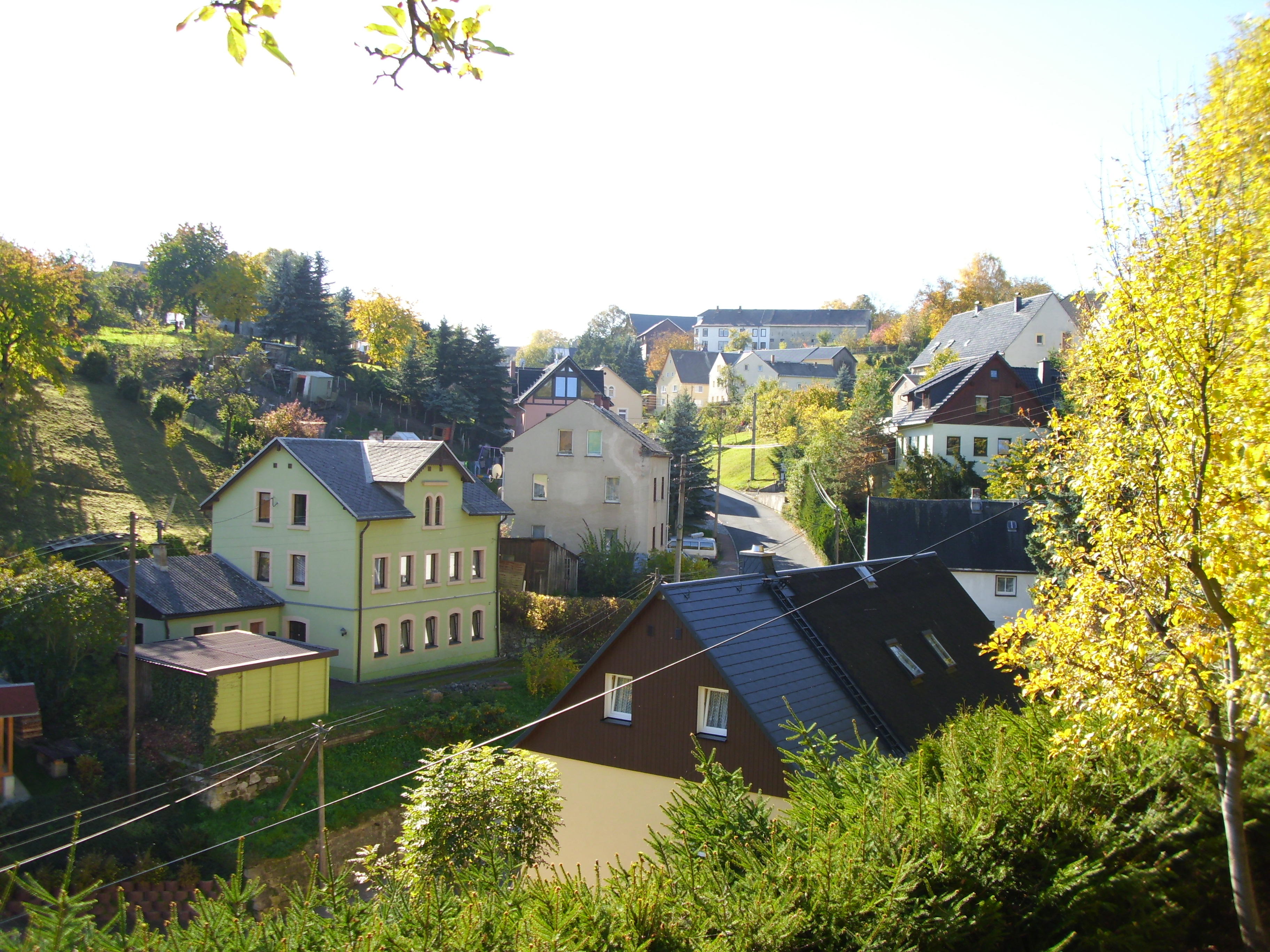 Das Niederdorf von Seifersdorf mit seinen eng aneinander in das Seitental der Weißeritz gebauten Häusern. Noch um 1880 war hier größtenteils Wiese bis auf einzelne Fachwerkhäuser.